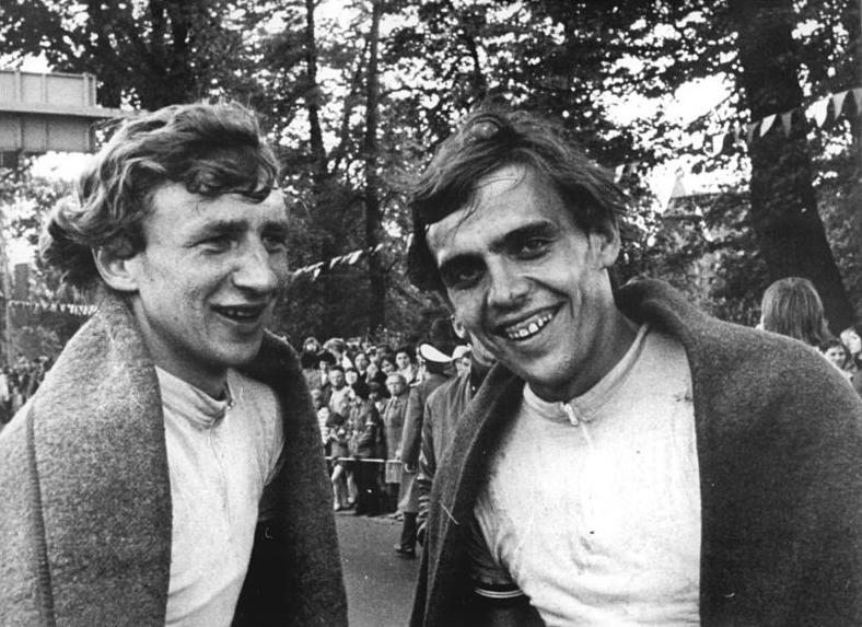 Wladimir Osokin, Juri Zajak ADN-ZB Reiche 13.5.77-str- Neubrandenburg: 30.Internationale Friedensfahrt 5.Etappe Szecin-Neubrandenburg über 155 km. Der "Mann des Tages" Wladimir Osokin (l.), er gewann zwei Prämienspurts und den entscheidenten Sprint um den Etappensieg,freut sich gemeinsam mit seinem Mannschaftskameraden Juri Zajak,wertvolle Sekunden für die Mannschaftswertung gesichert zu haben.